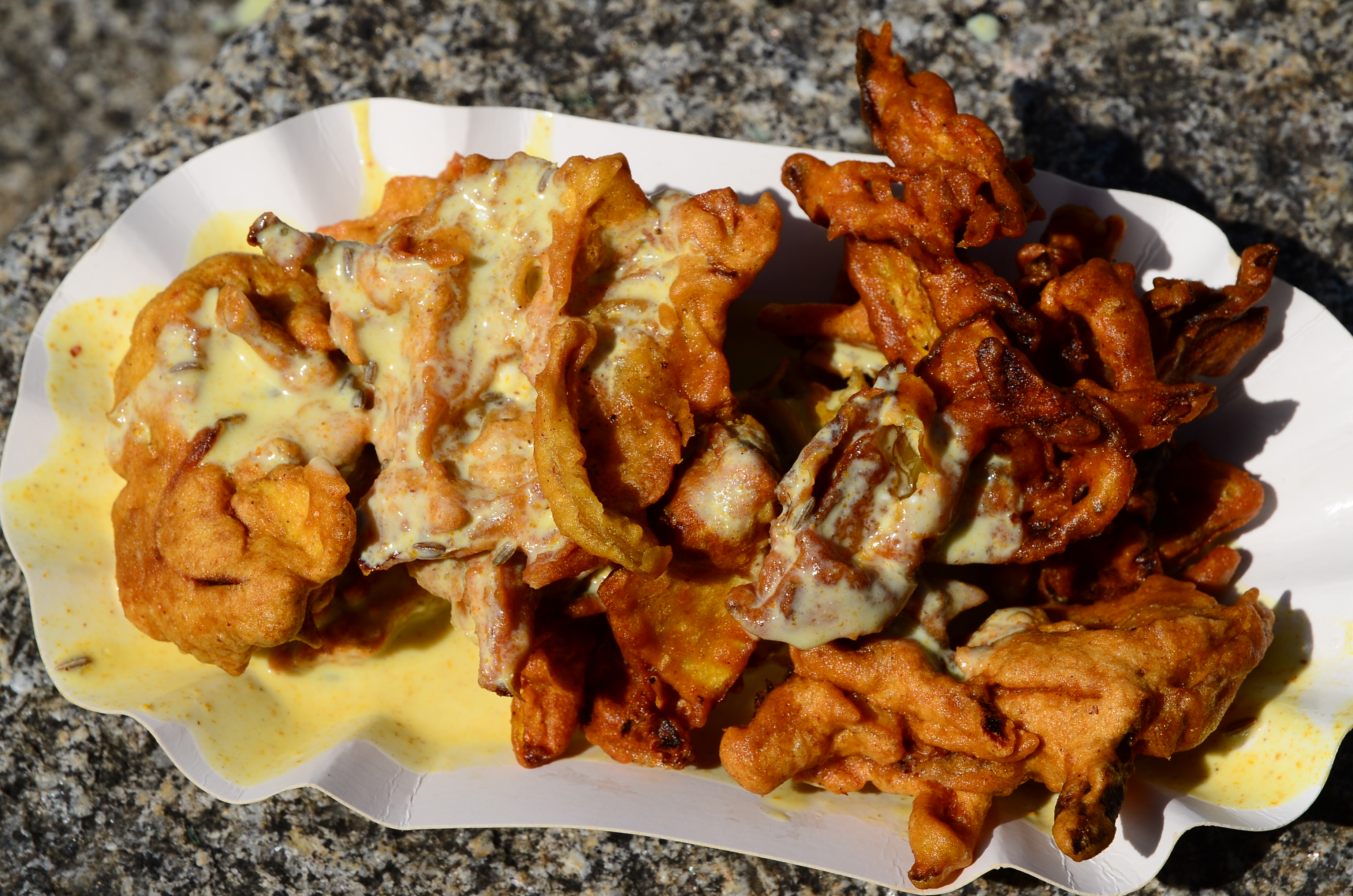 Sechseläuten, Pakora (Kartoffel) mit Joghurt-Curry-Sauce , Limmatquai in Zürich (Switzerland) Sechseläuten in April 2013